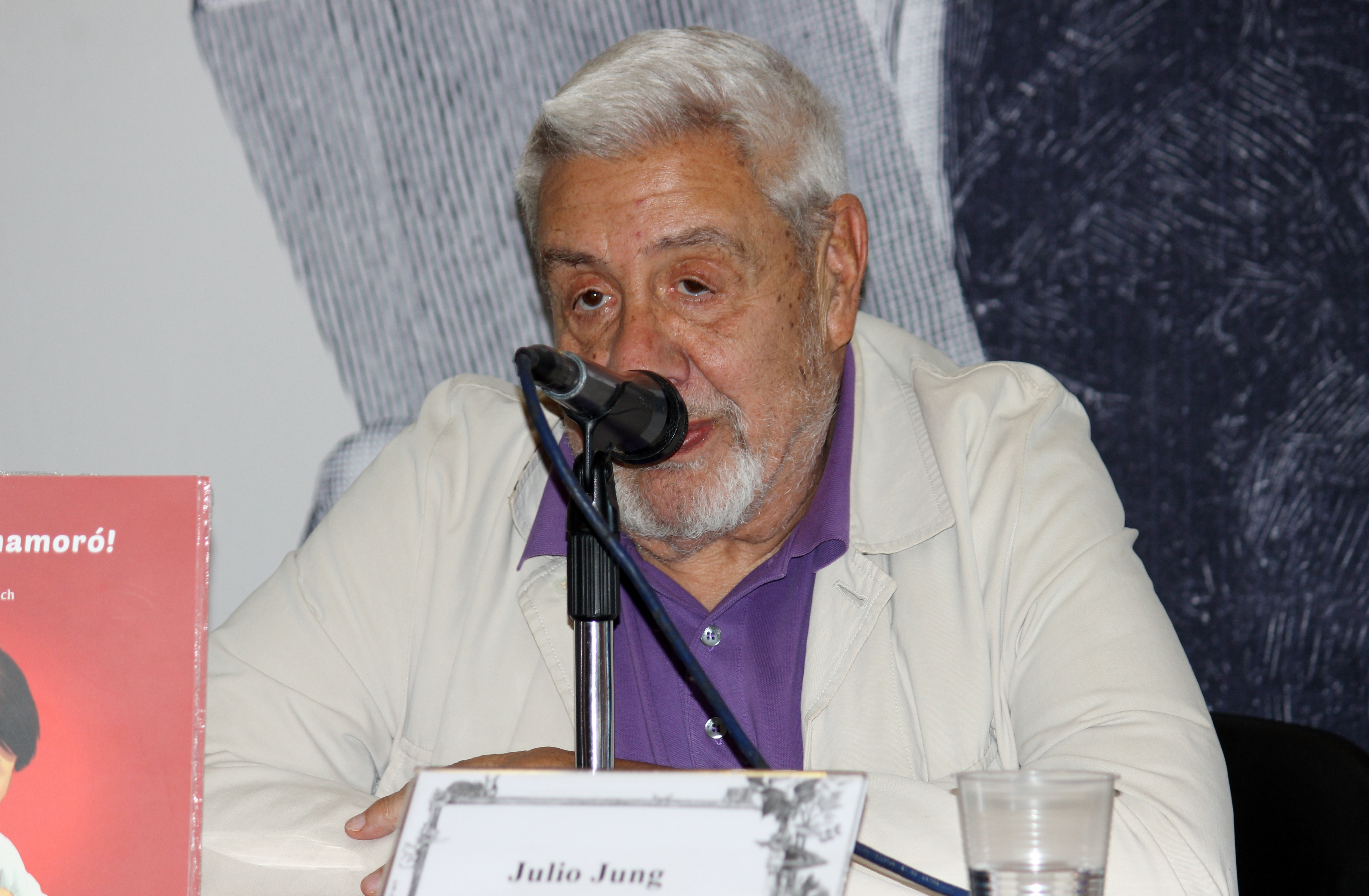 El actor chileno Julio Jung en la Feria Internacional del Libro de Santiago 2018 durante la presentación del libro infantil ¡Abuelita se enamoró!, de la escritora francesa Danièle Ball y del ilustrador Cristián Montes Lynch (Chile).